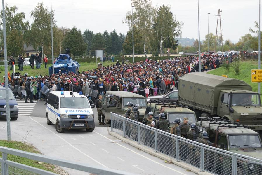 Slovenska vojska pri reševanju migrantske situacije z več zmogljivostmi.